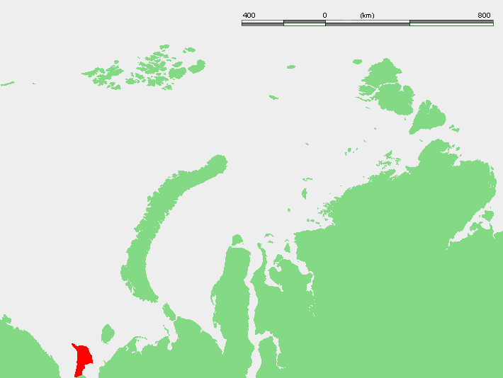 Localización de la península de Kanín.